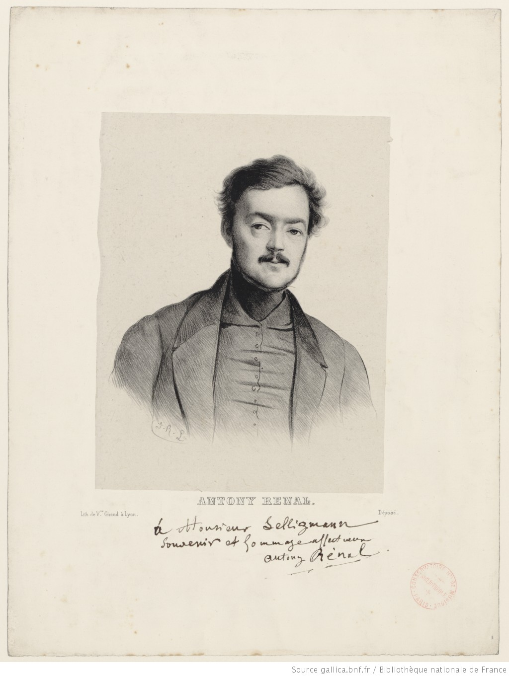 Antony Renal, lithographie signée J.R.L.